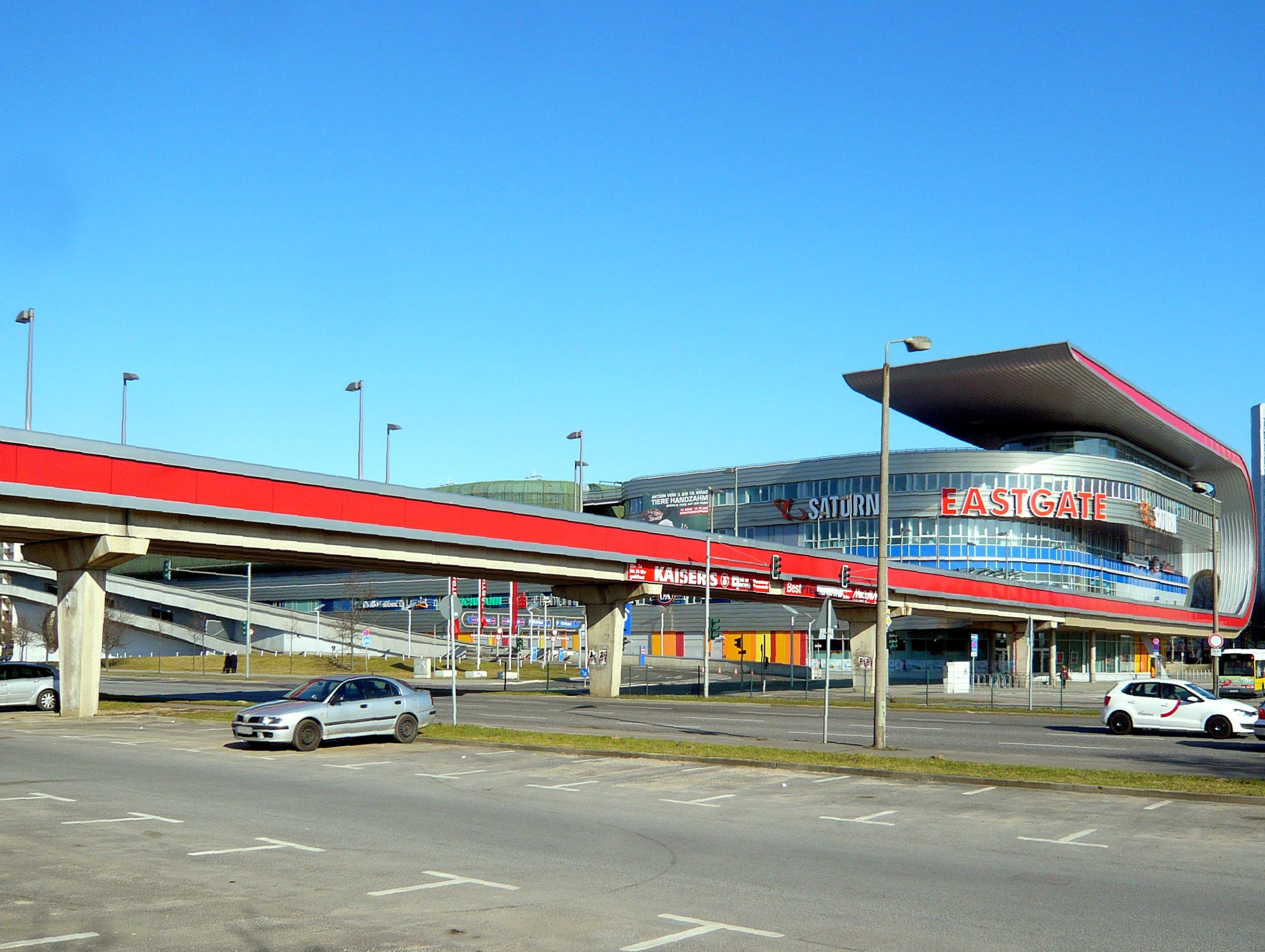 Marzahn, Märkische Allee, Eastgate